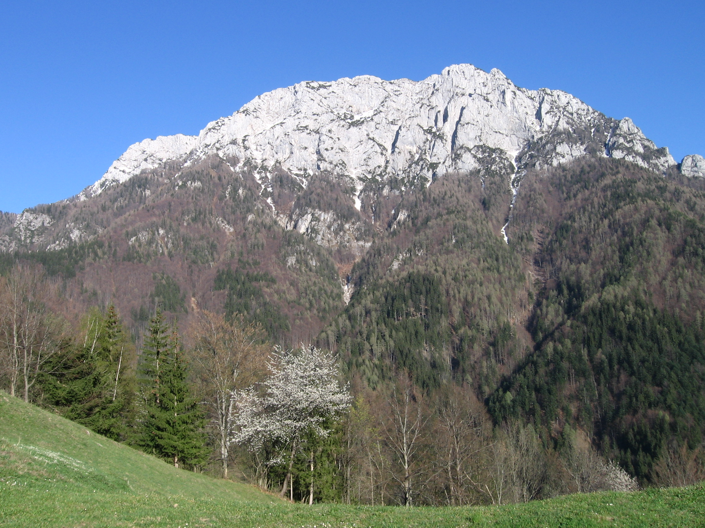 Mt. Raduha in Kamnik-Savinja Alps, western side - from Tolstovršnik farm